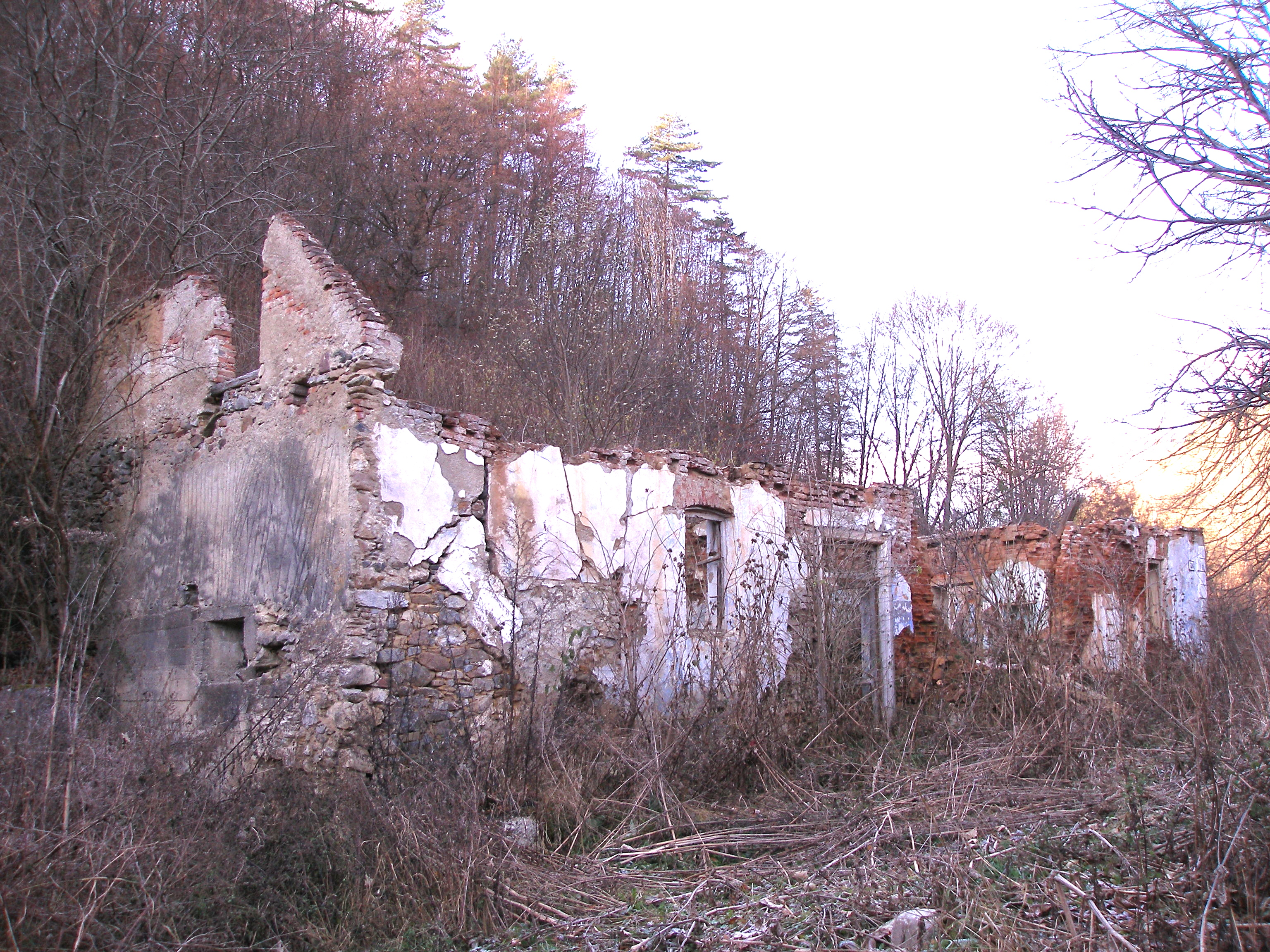 Zrúcanina mlyna v údolí potoka Sopotnica v katastri obce Sedlice.